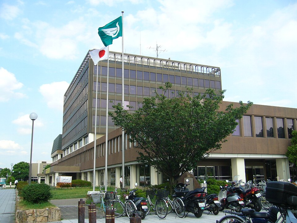 伊丹市役所